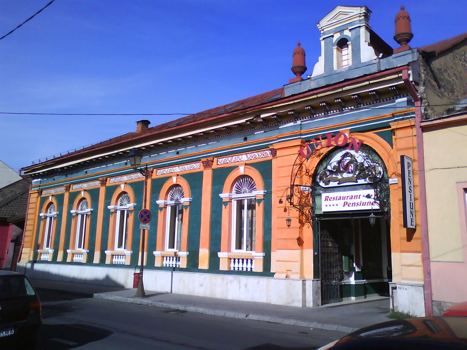 Restaurantul Casino - Baia Mare